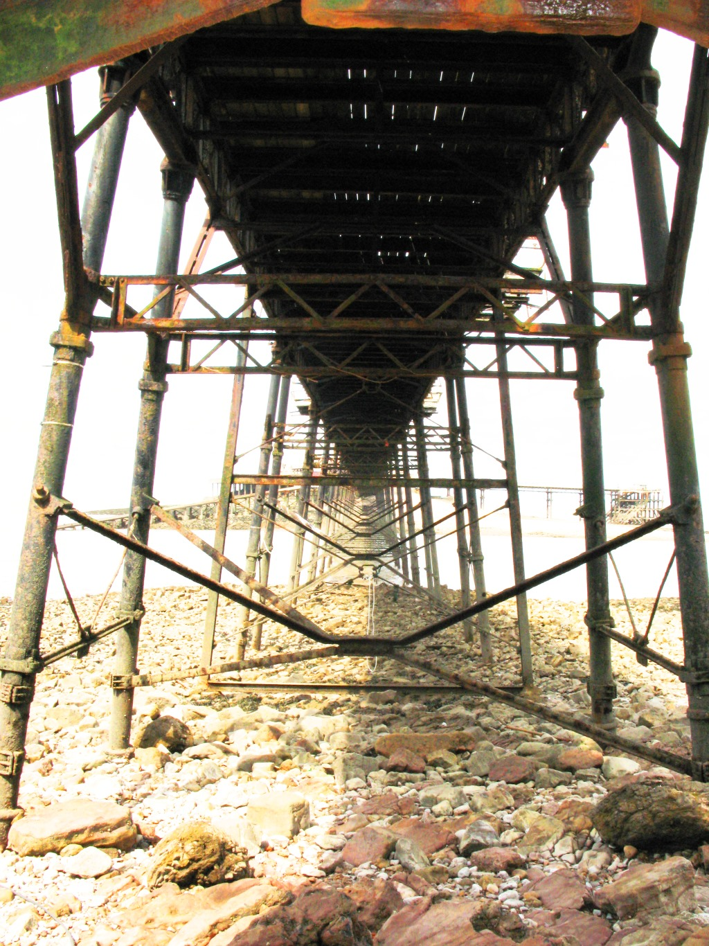 View underneath Birnbeck pier, Weston-super-Mare, North Somerset, England.